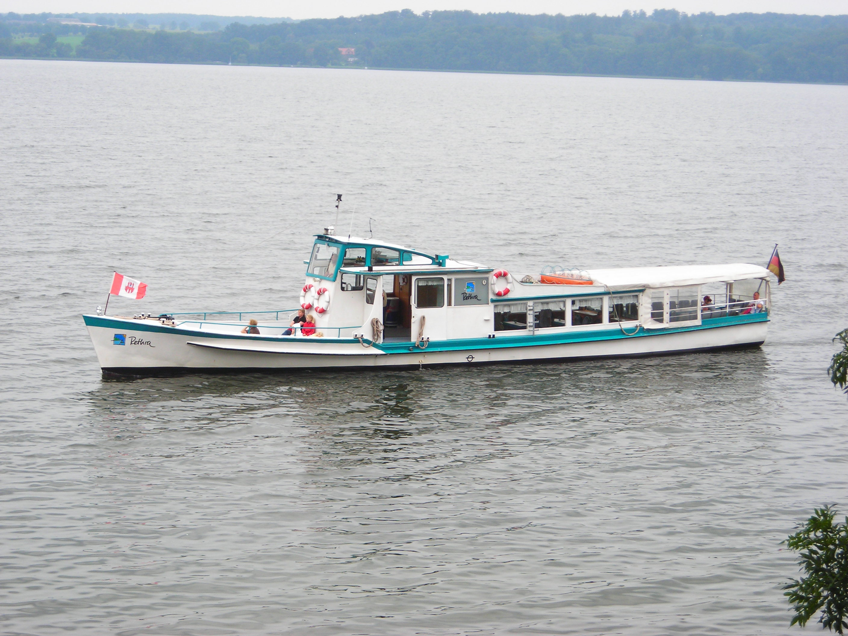 Motorschiff Rethra auf dem Tollensesee in der Nähe von Klein Nemerow